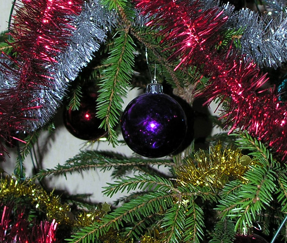 Eglutė 2006-12-22